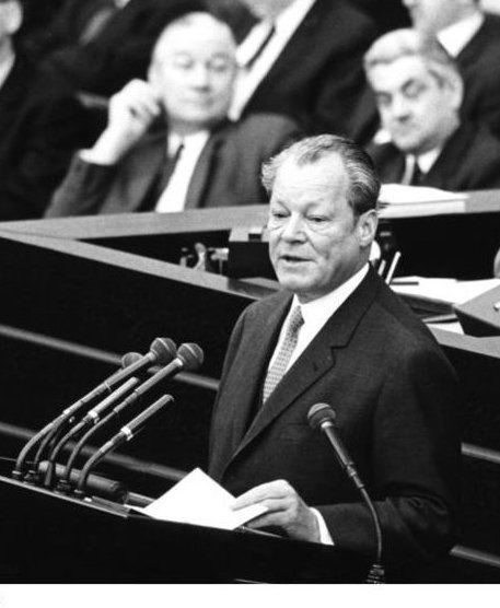 28. Januar 1971 Bundeskanzler Willy Brandt: Bericht zur Lage der Nation im Bundestag